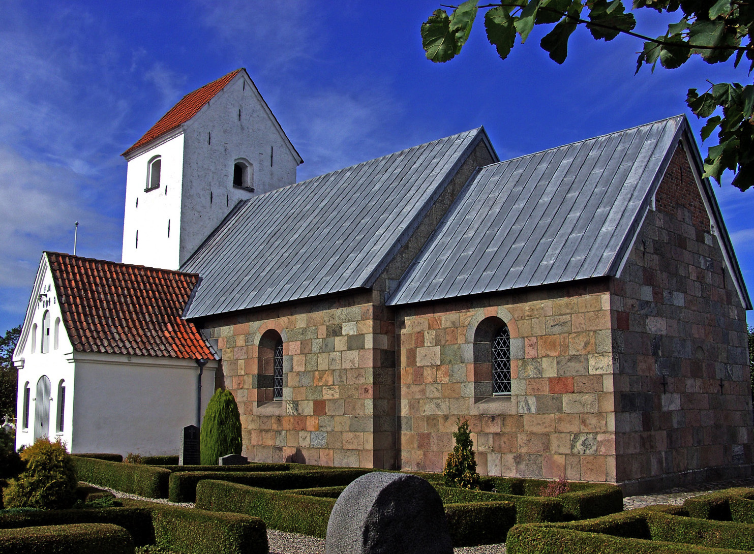 fra sydvest